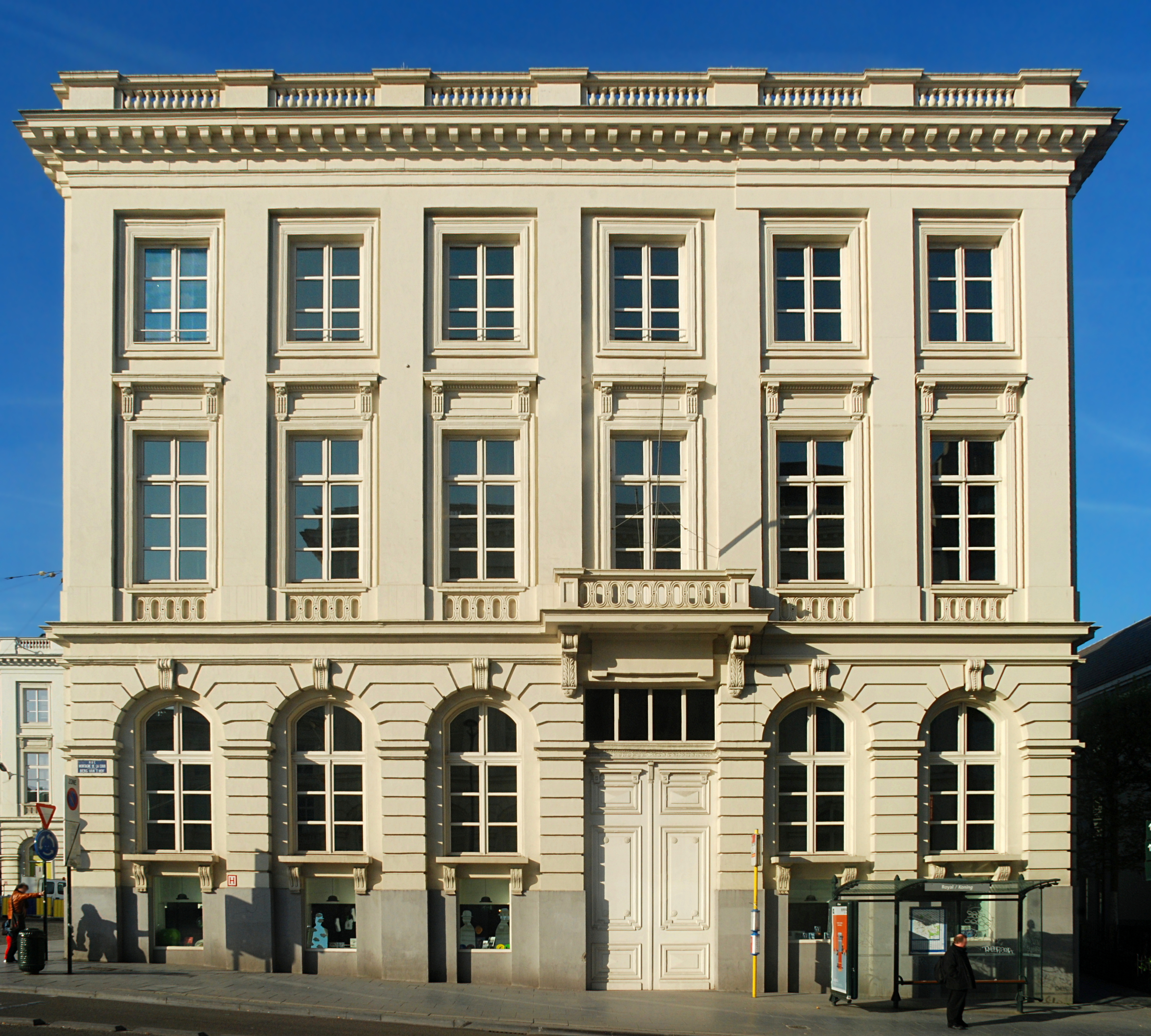 Belgique - Bruxelles - Place Royale - Hôtel du Lotto